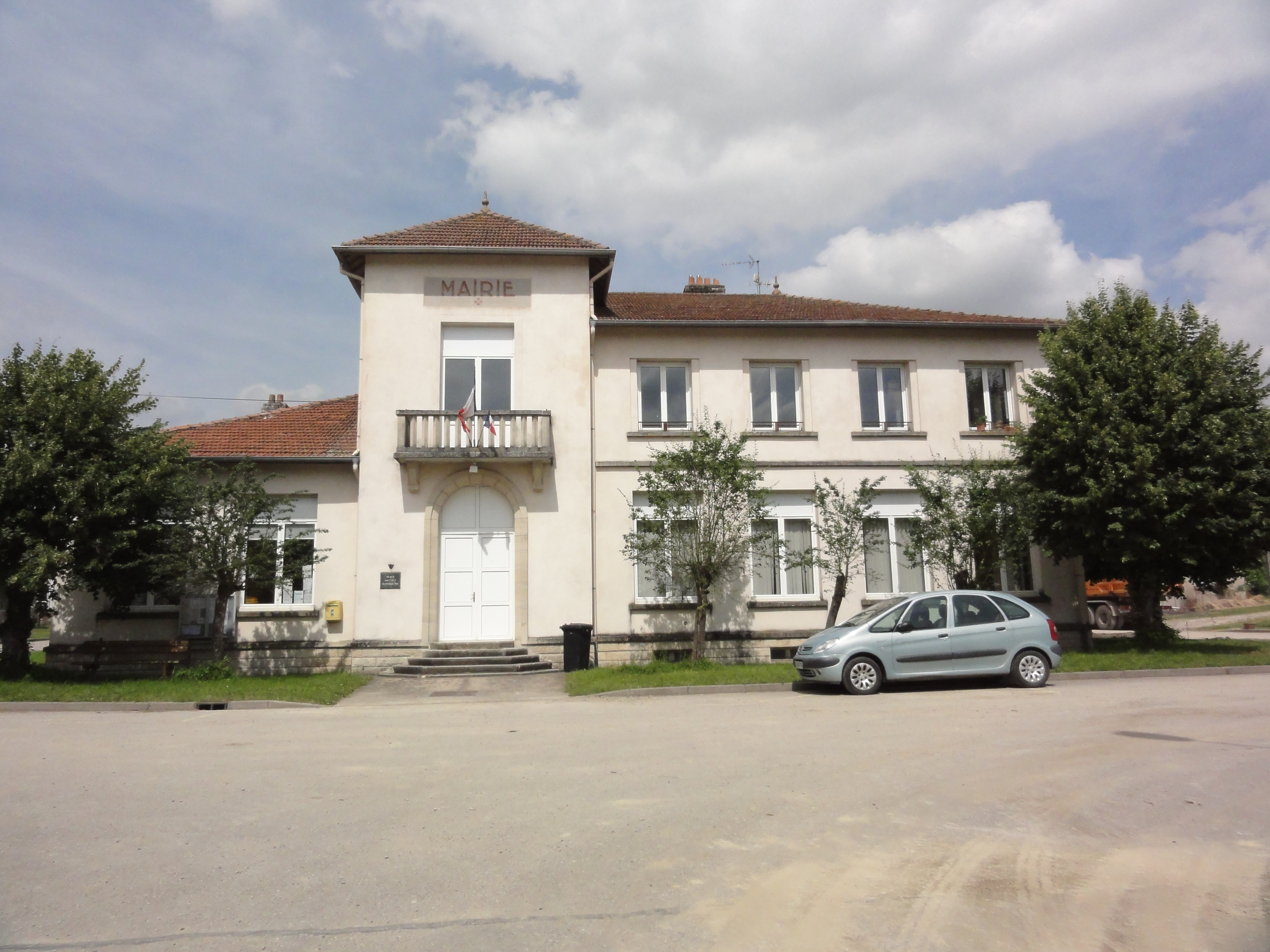 Saint-Rémy-aux-Bois (M-et-M) mairie